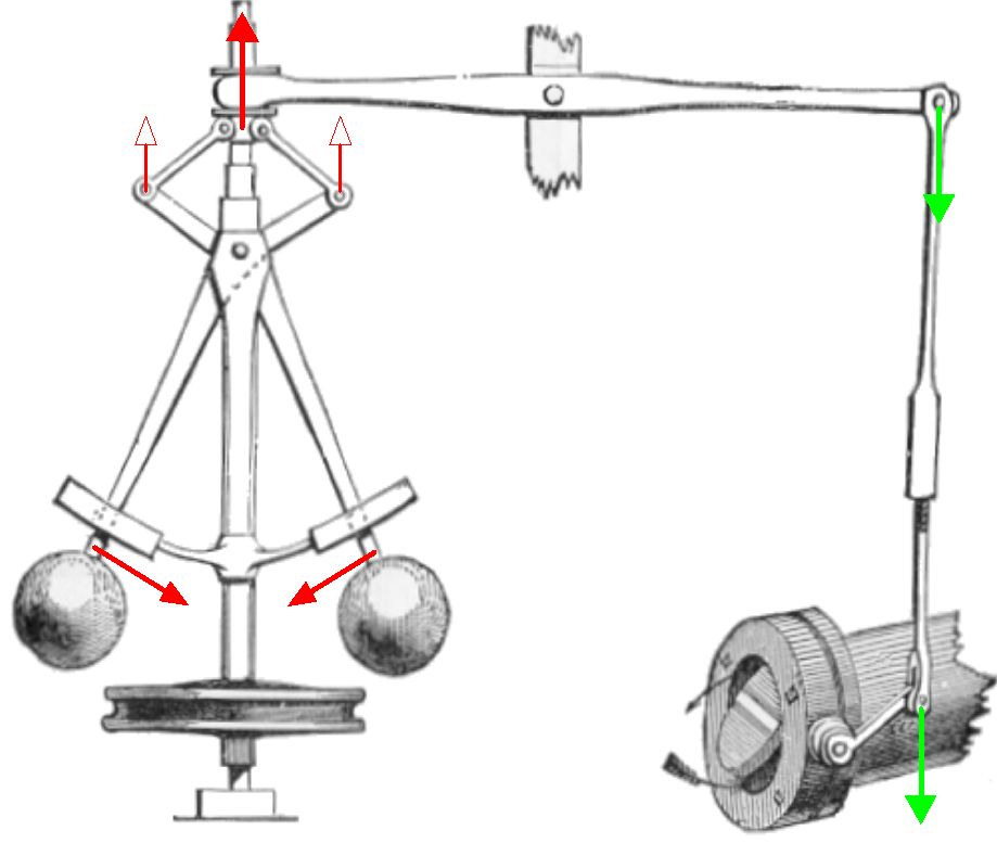 Drehzahlregler nach James Watt